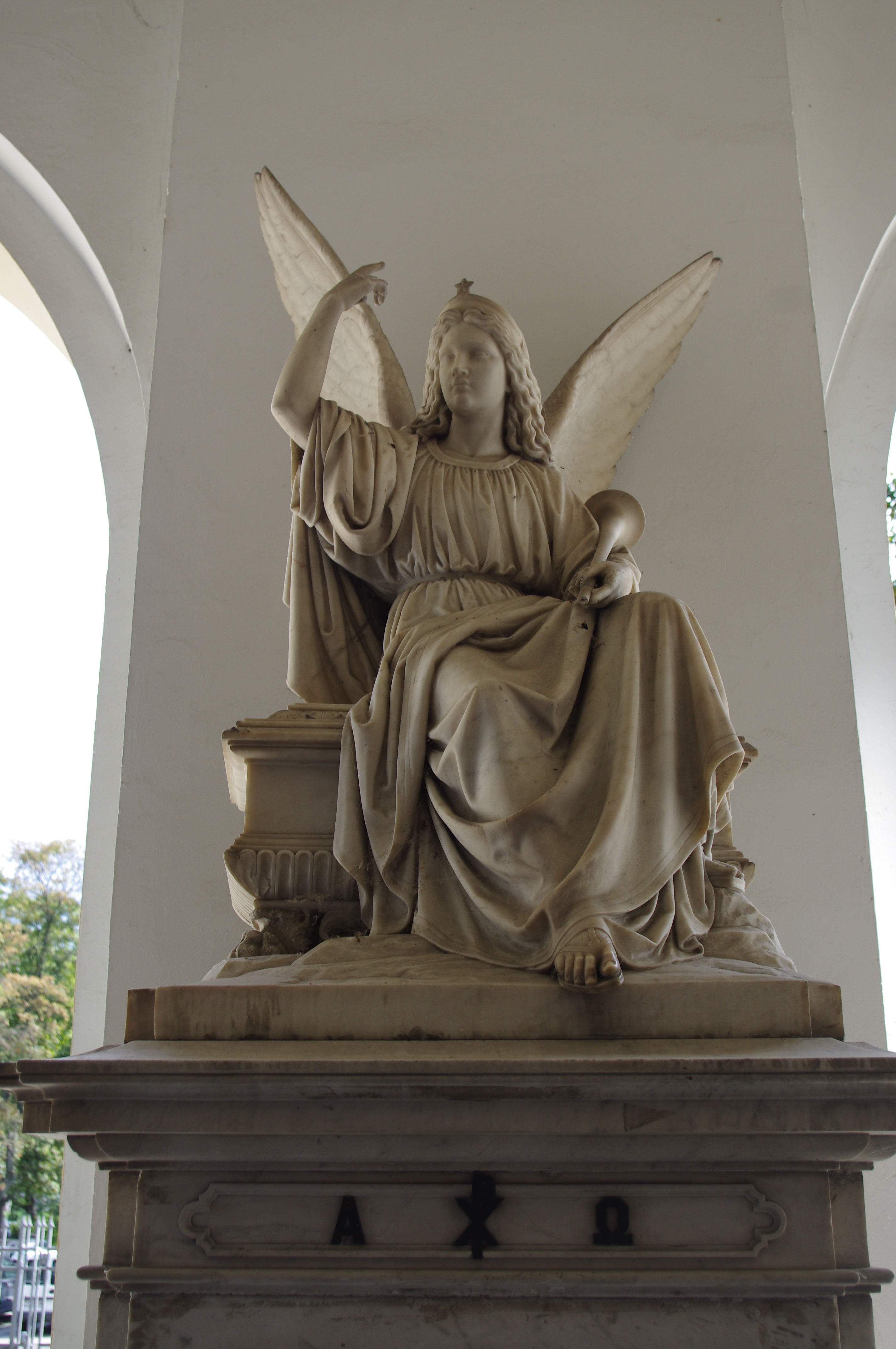 Rzeźba Bolesława Syrewicza przy wejściu do Kościoła św. Stanisława Kostki w Warszawie